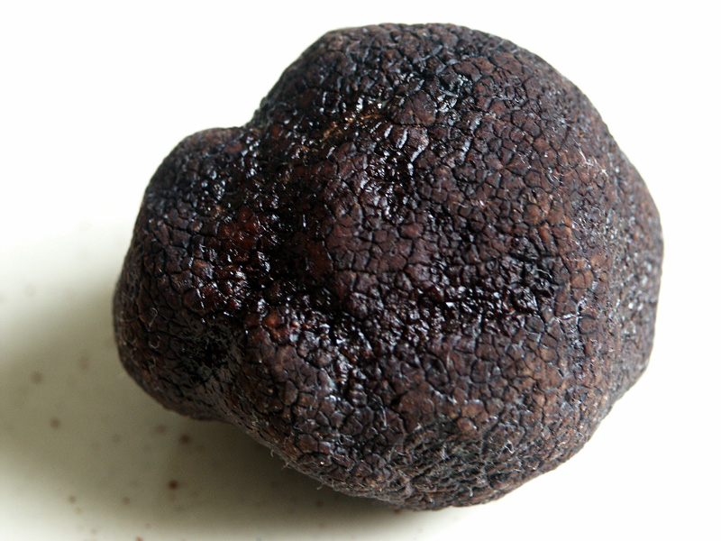 Truffe noire du Périgord, récolte 2006